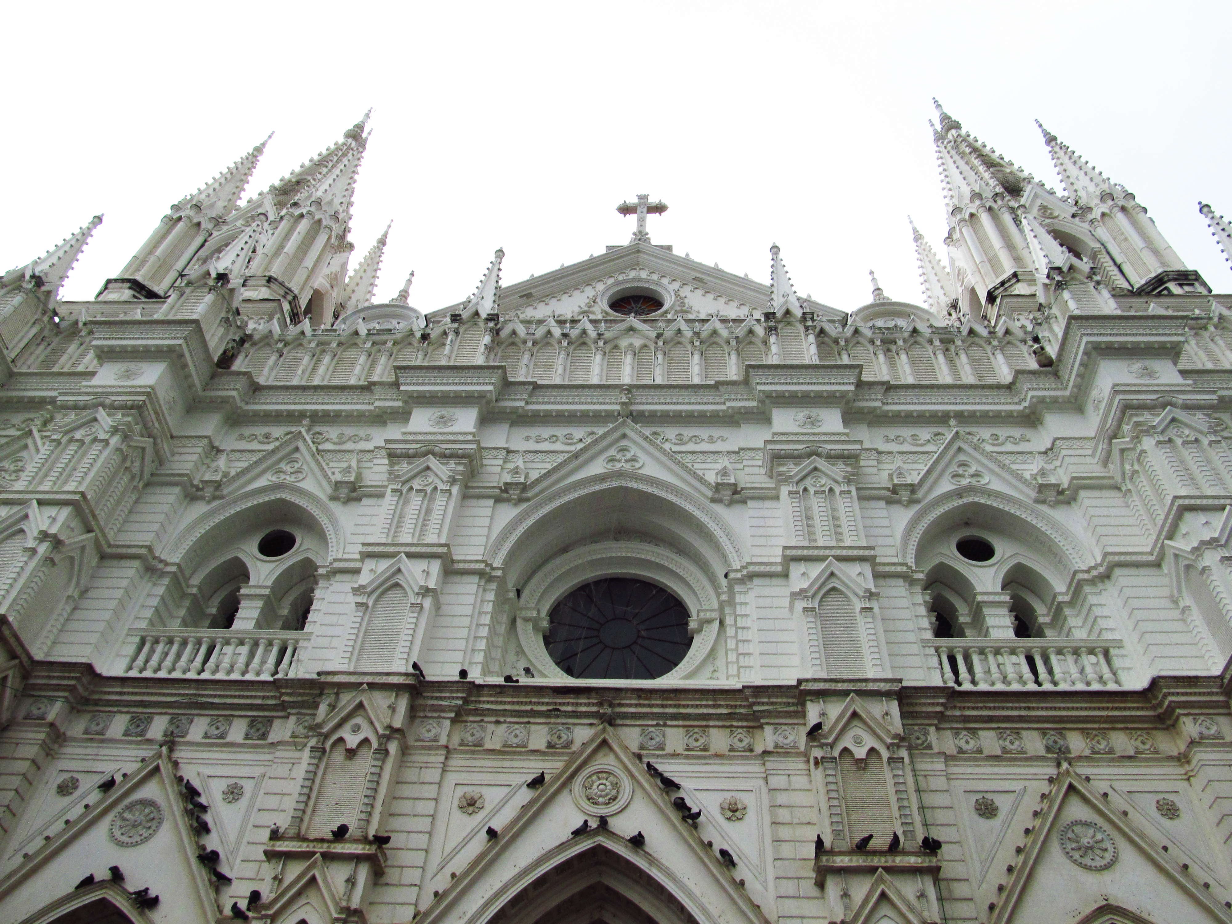 Diferente a todas las iglesias de America Latina. Construida con el estilo arquitectónico gótico